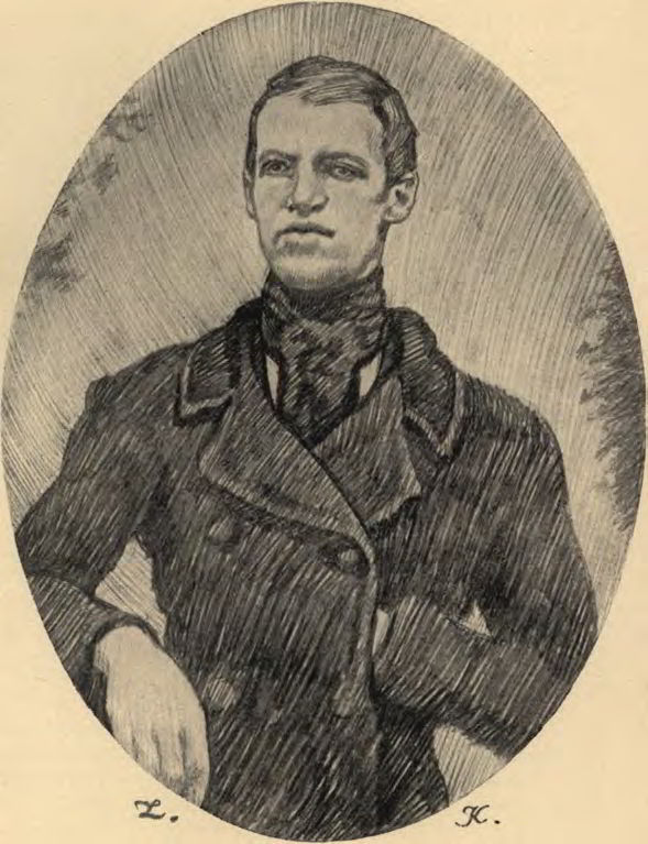 Podobizna Edwarda Dembowskiego z krótkiemi włosami została zrobiona z dagierotypu, na odwrotnej stronie którego znajduje się podpis Aleksandra Karpińskiego, wspołdziałacza i przyjaciela Edwarda, następujacy: „Edward Dembowski, Syn Leona i Julji z Kochanowskich, urodzony 31 maja 1822 r., zginął w Podgórzu d. 27 lutego 1846 r.“